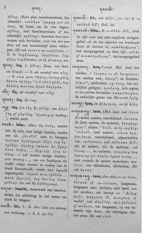 Kamus dwibahasa Madura-Belanda, N.H. Kiliaan, 1905